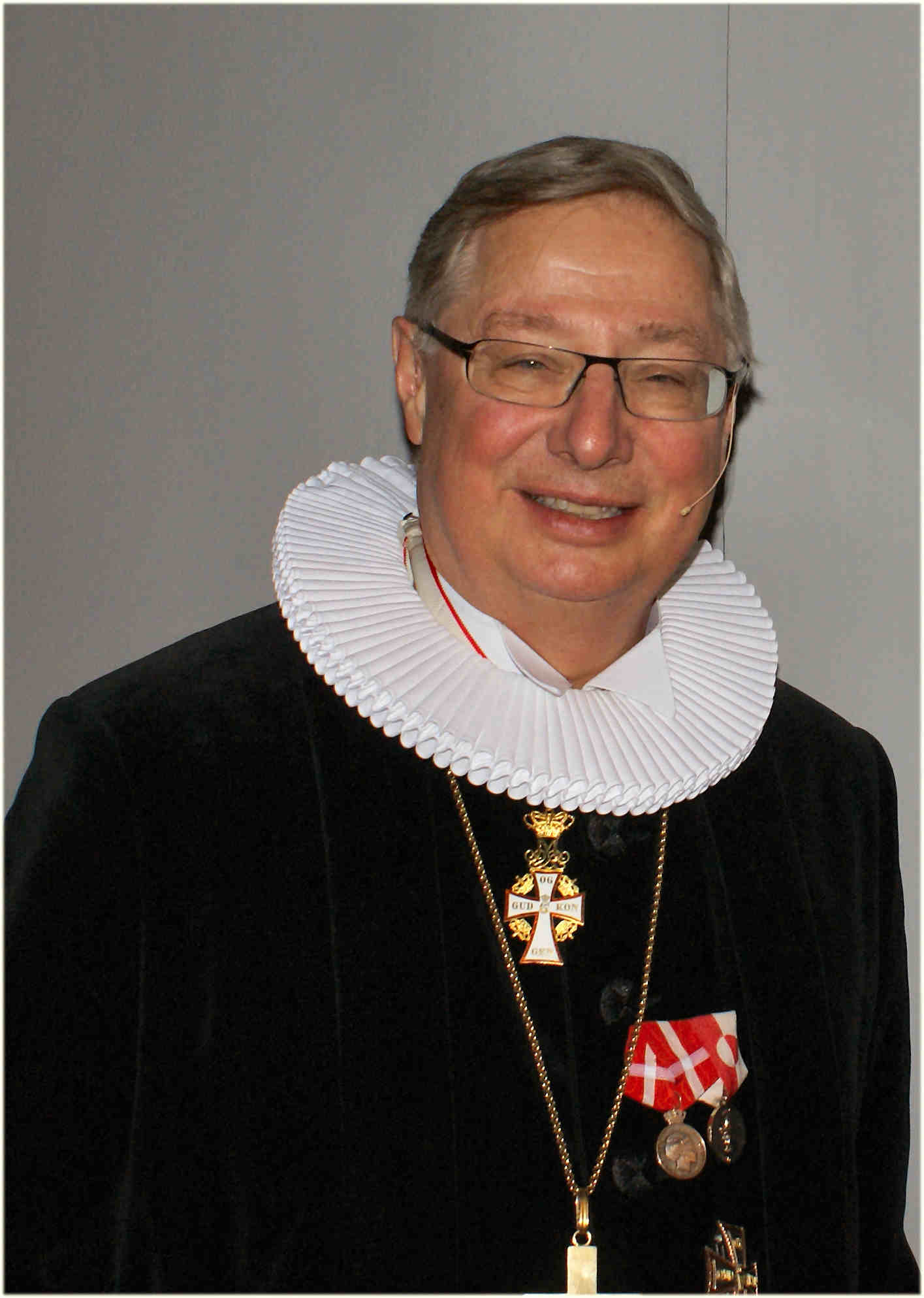 Bishop Erik Norman Svendsen, Copenhagen